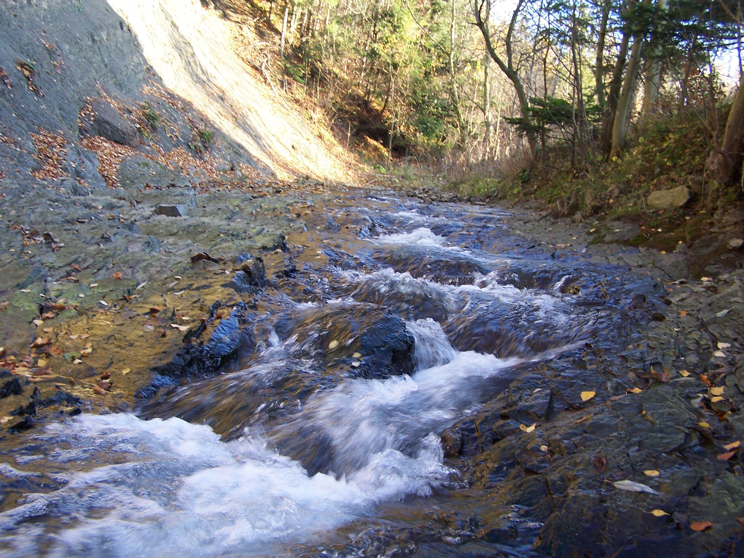 Czarna Rzeka - dopływ Słopniczanki